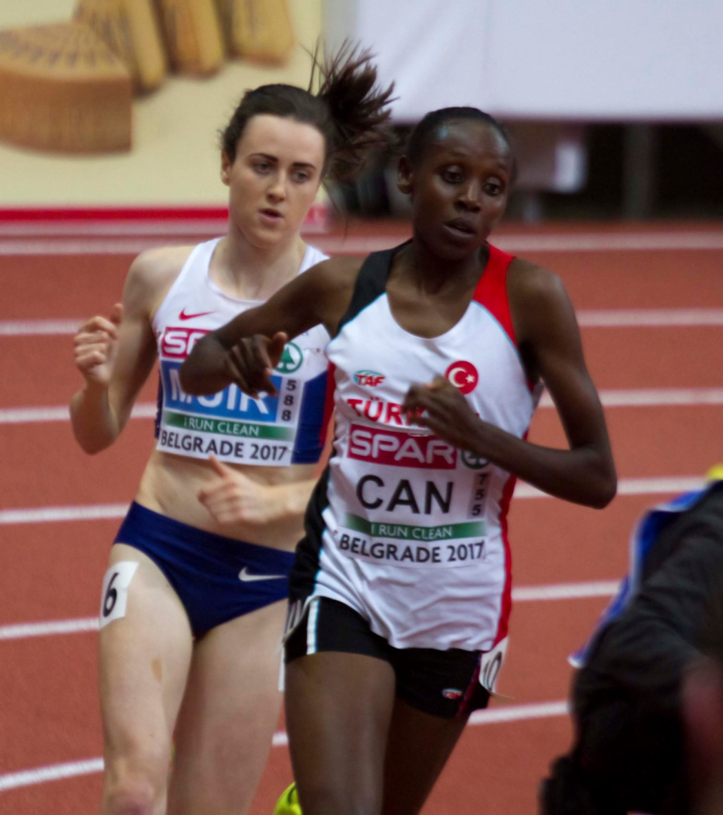 302 3000m muir can